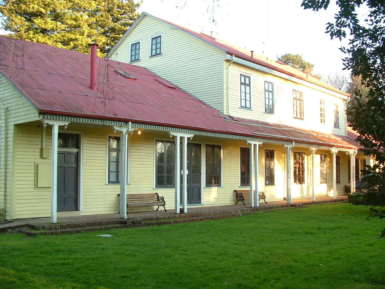 Casa de Carlos Andwanter This is a photo of a national monument in Chile: 167